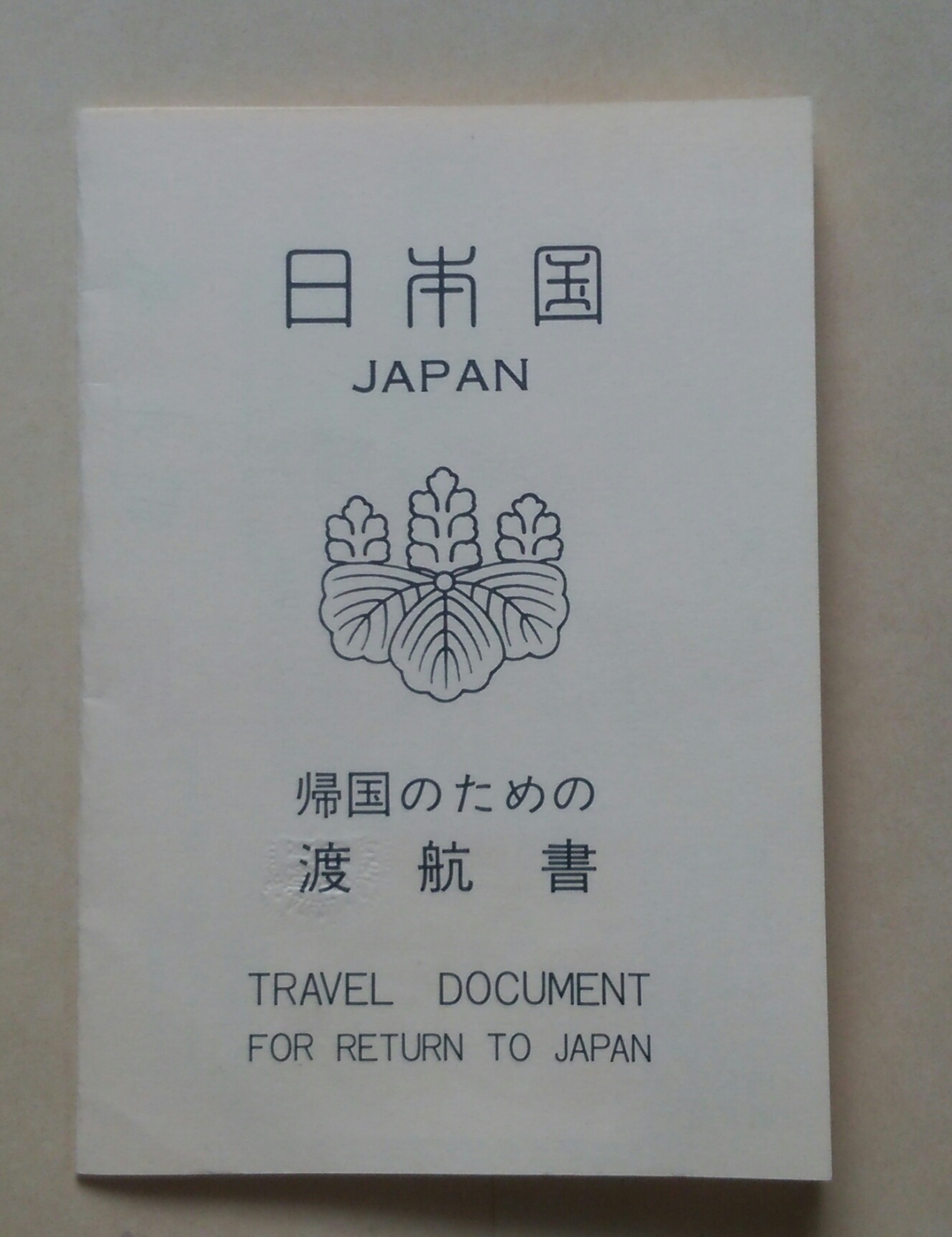 日本国在外公館が発給する代用旅券「帰国のための渡航書」